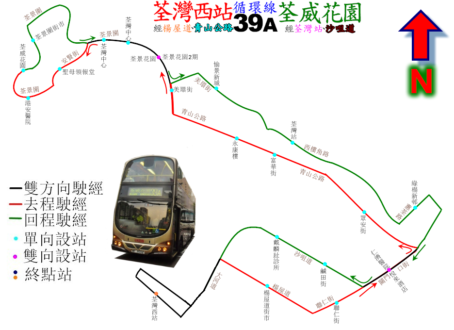 中文（香港）: 九巴39A線之走線圖